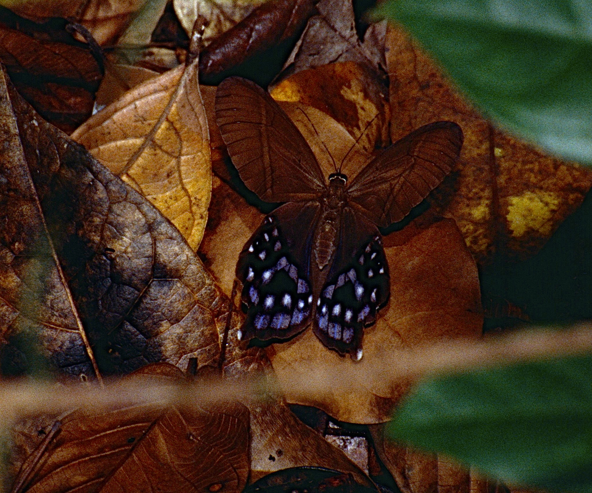 Réserve du Mont Grand Matoury, Guyane, FRANCE, 1998. (Photo en gros plan)